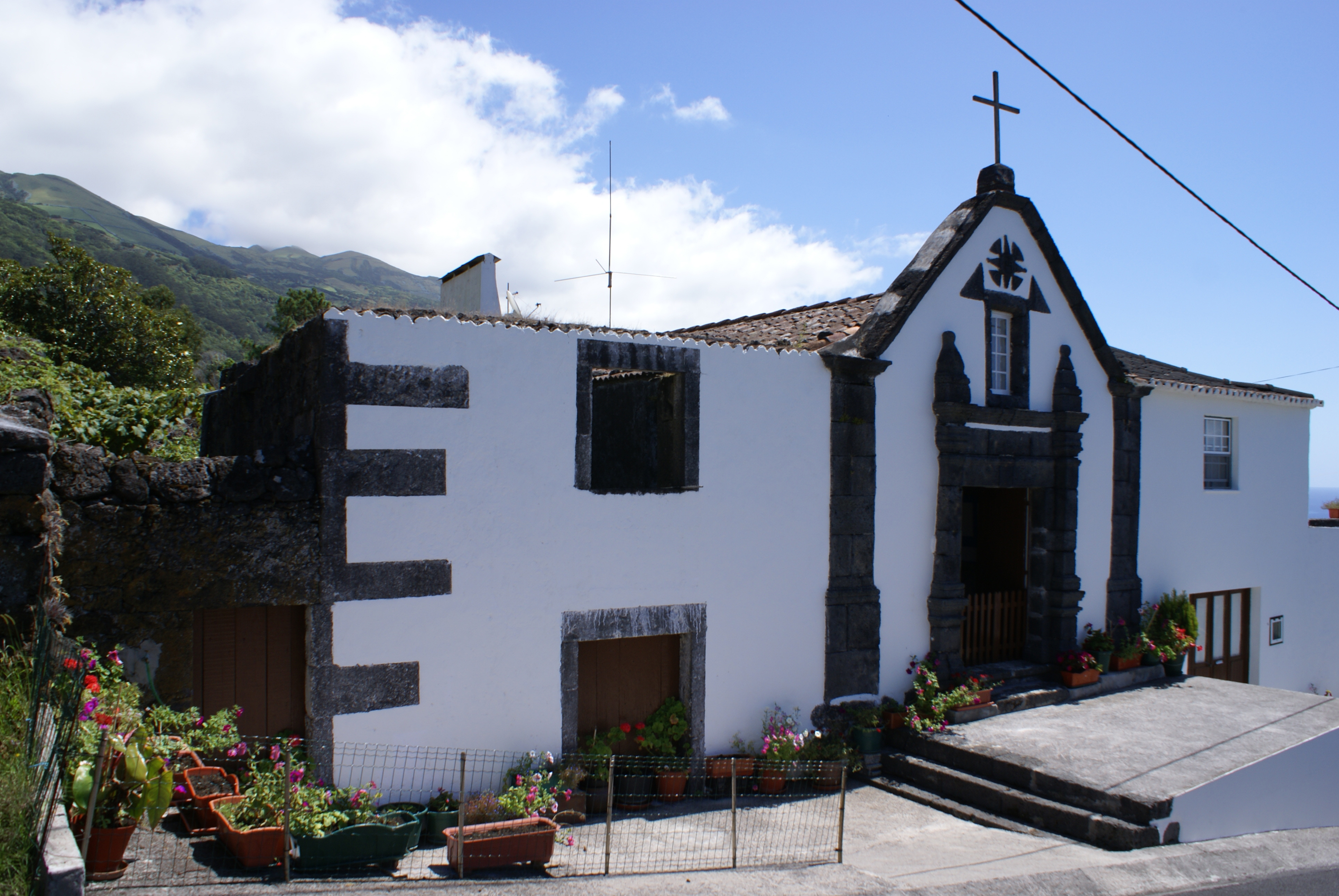 Ermida de São José, Fachada, Urzelina, Velas, São Jorge, Açores